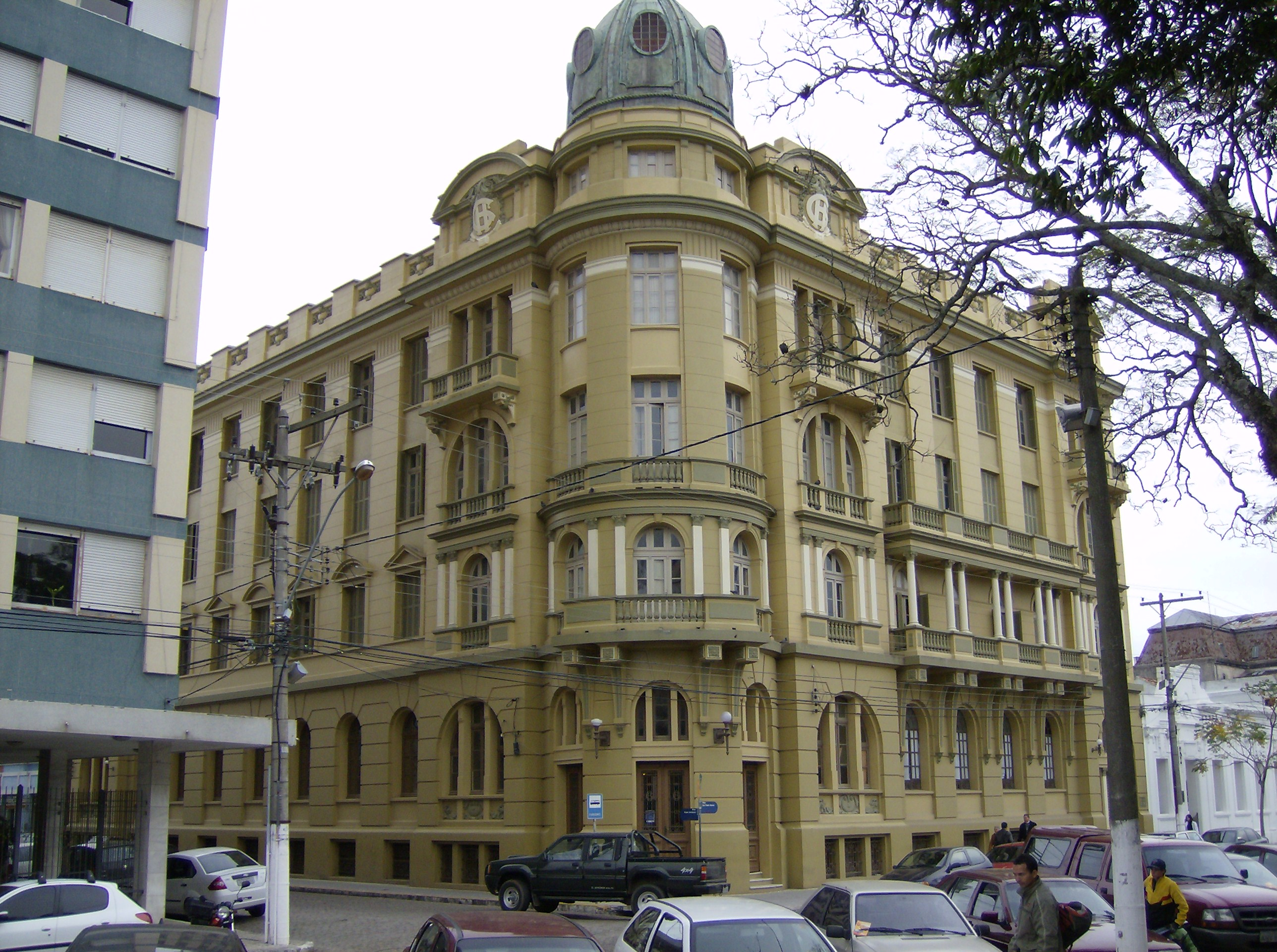 Grande Hotel, Pelotas, Brazil